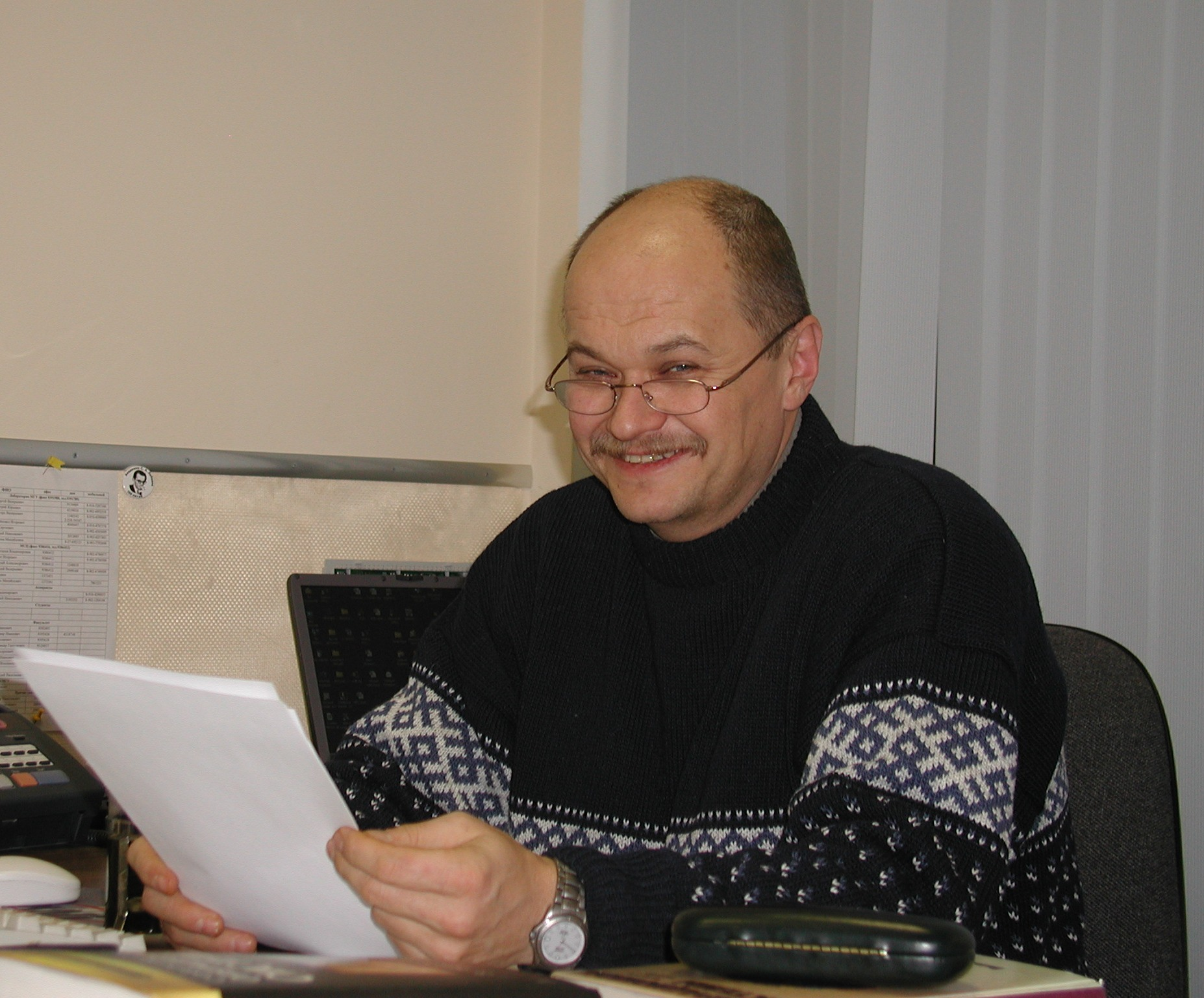 Игорь Валерьевич Машечкин — математик, доктор физико-математических наук, профессор кафедры автоматизации систем вычислительных комплексов факультета ВМК МГУ.